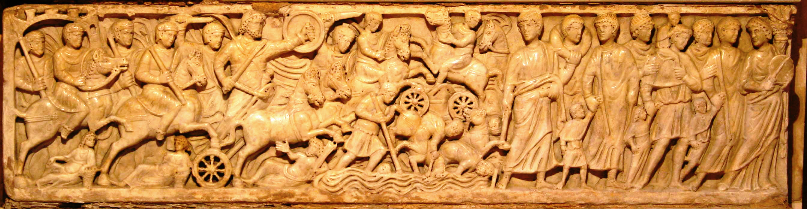 Arles (Bouches-du-Rhône,France), dans l'ex-cathédrale Saint-Trophime, sarcophage paléochrétien représentant la traversée de la Mer Rouge.